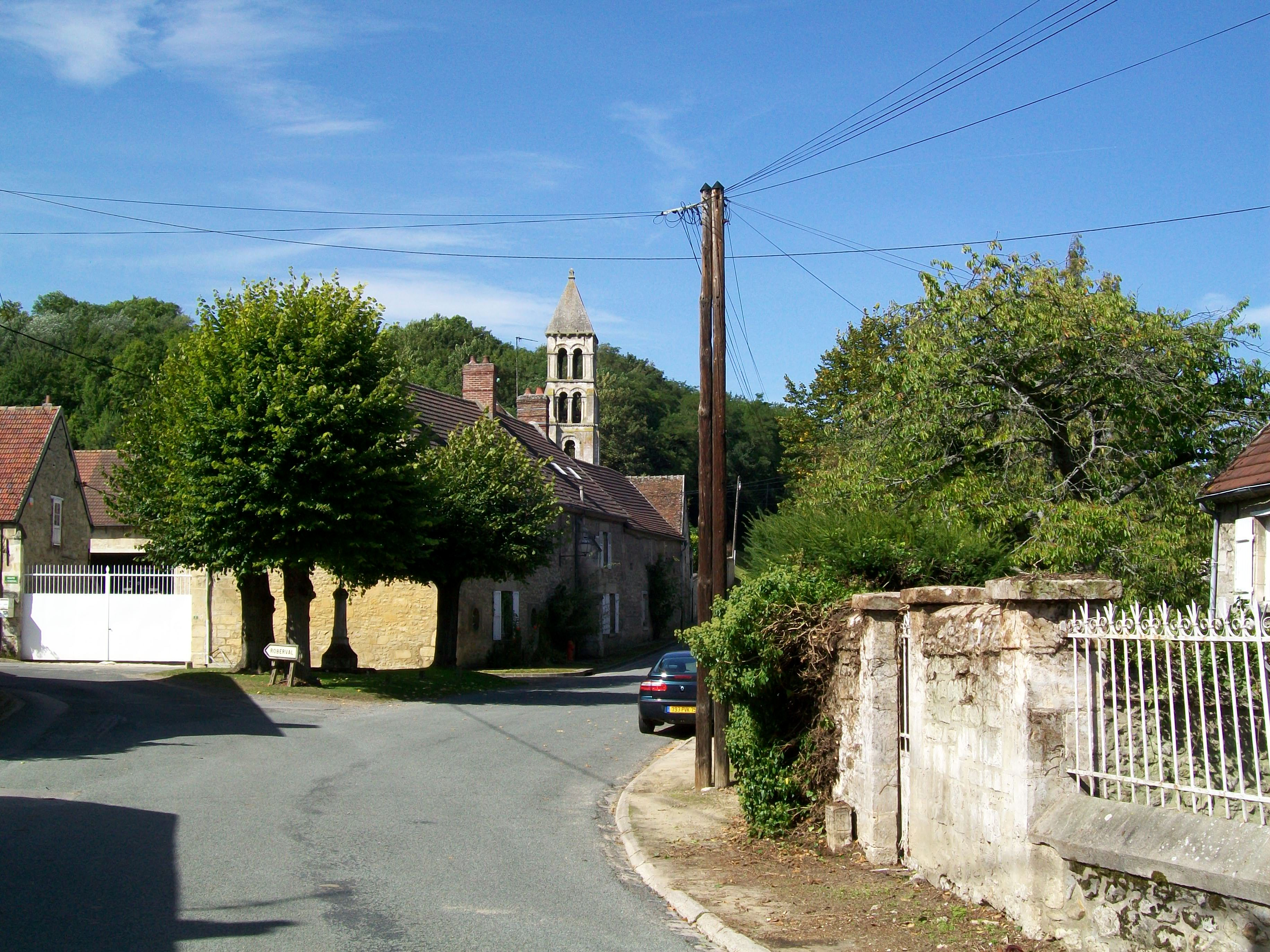 La place du village de Rhuis avec le calvaire en son centre ; au fond, l'église.